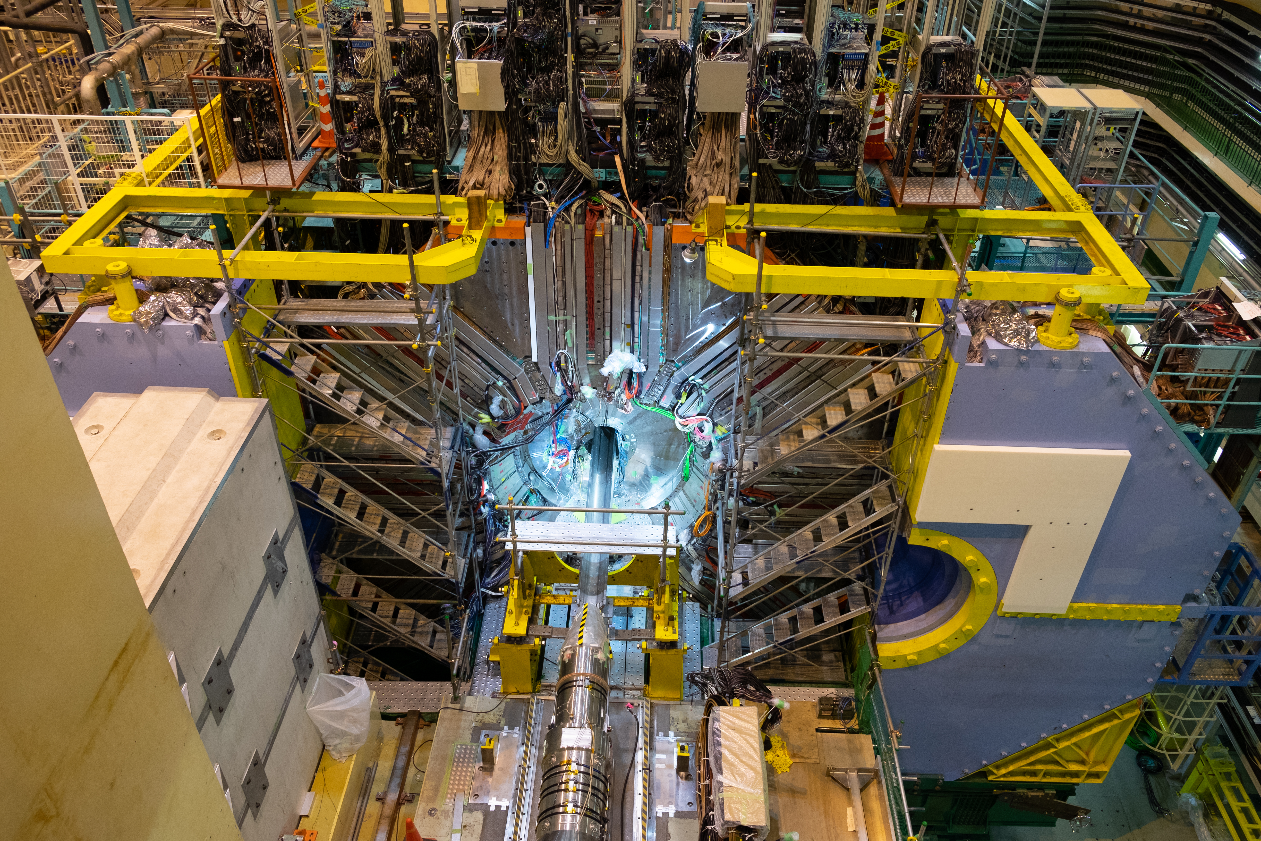 Belle II計測器 2018/09/02 KEK一般公開日に撮影